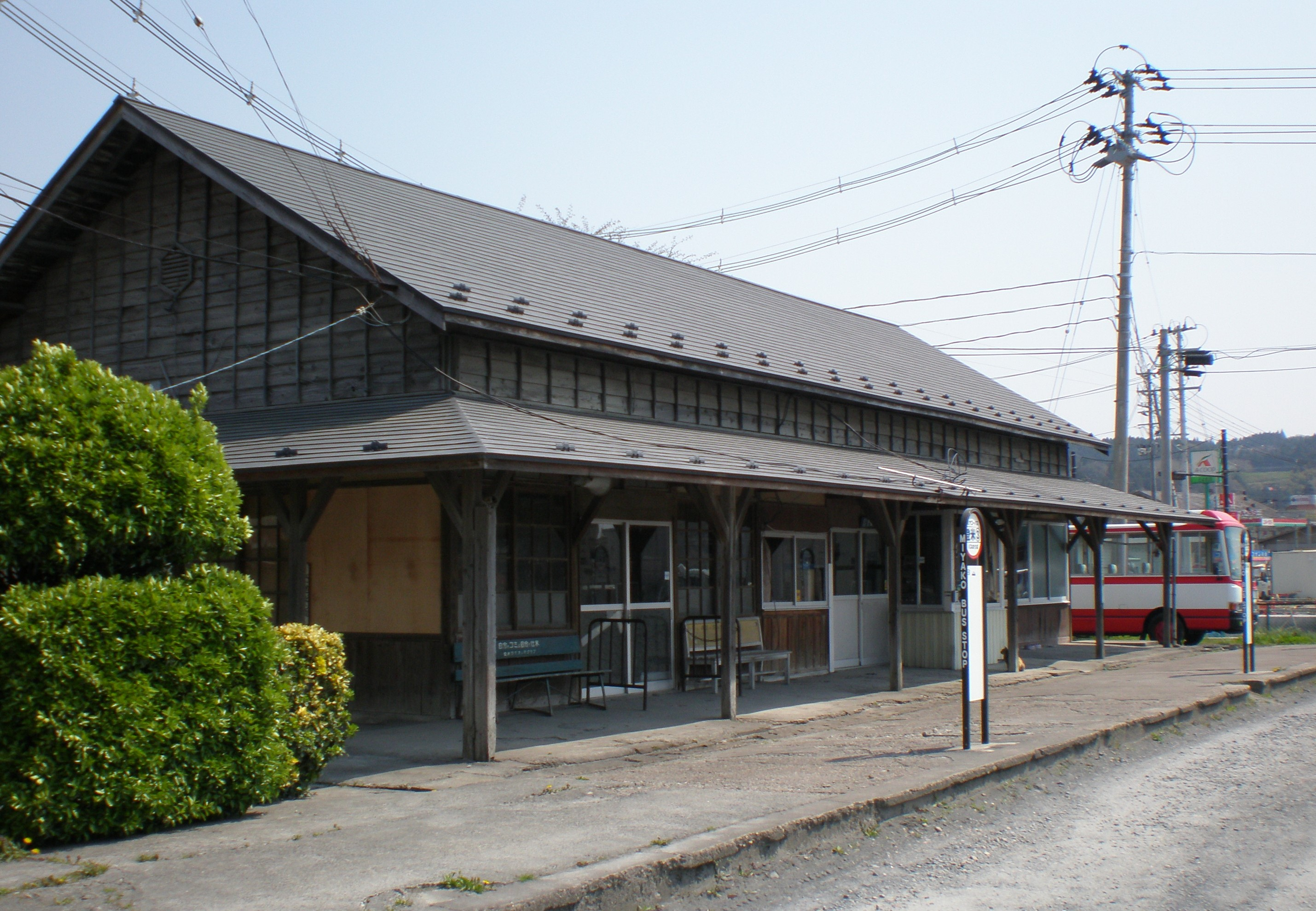 仙北鉄道旧登米駅舎（2007年4月）